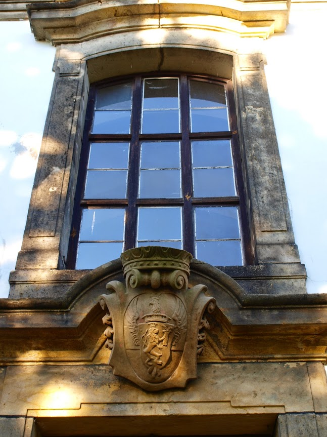 Velký Valtinov kostel